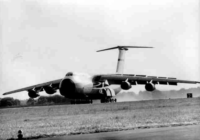 Eine Galaxy landet auf dem Heeresflugplatz Celle